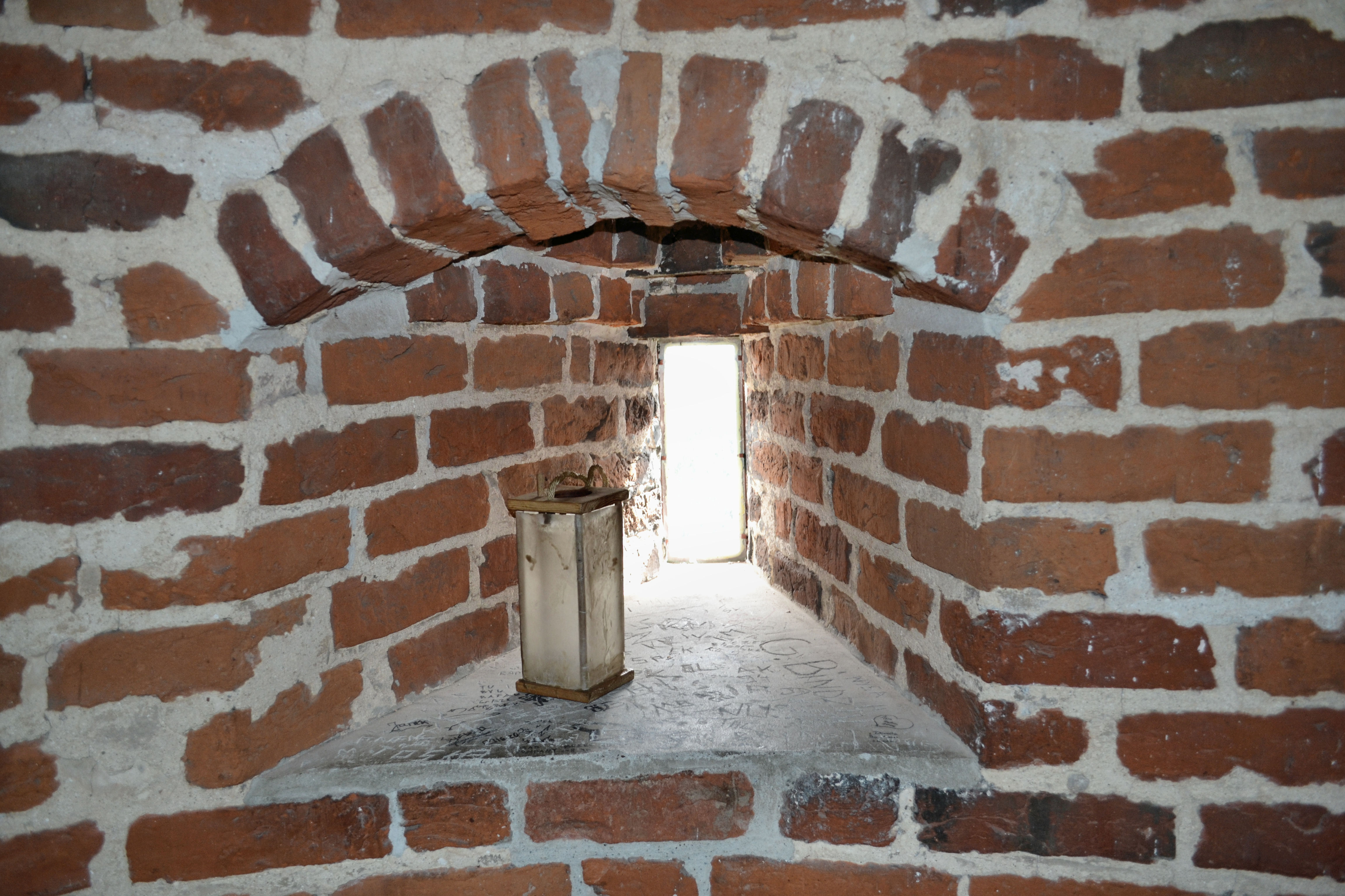 Trzebiatów - obwarowania miejskie, "Baszta Kaszana"